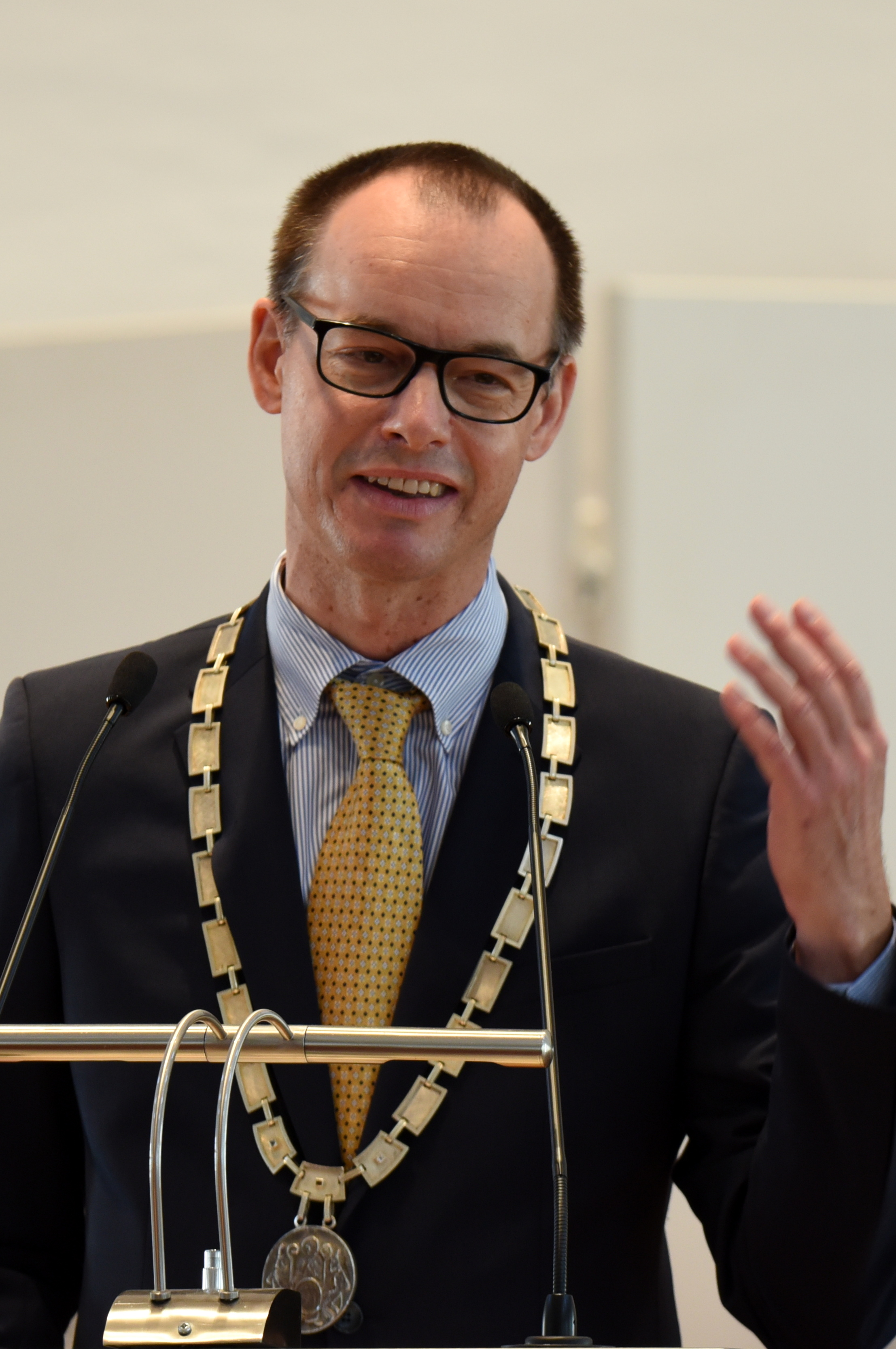 Martin Knoll, Dekan der Kultur- und Gesellschaftswissenschaftlichen Fakultät, bei der Sponsions- und Promotionsfeier in der Universität Salzburg